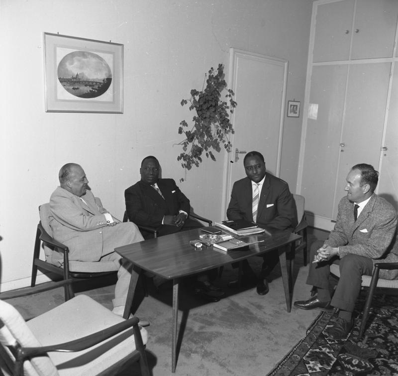 Der Minister für öffentliche Arbeiten aus Togo, Paul Amegee, bei Staatssekretär Steinmetz im Bundespostministerium